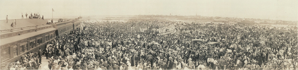 Встреча первого поезда новотокрытой Overseas Railroad в городе Ки-Уэст (Флорида).